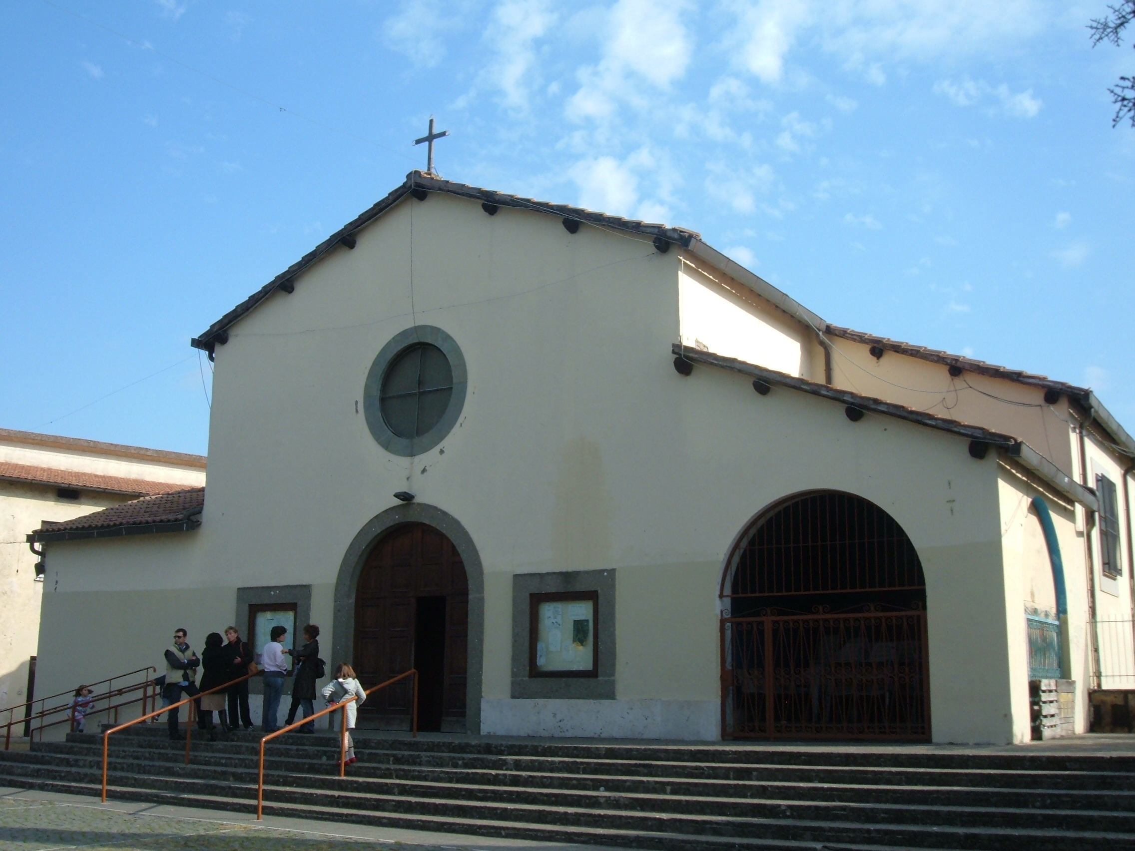 Chiesa parrocchiale di Sant'Antonio da Padova, a Roma, nella zona Marcigliana (Salaria).